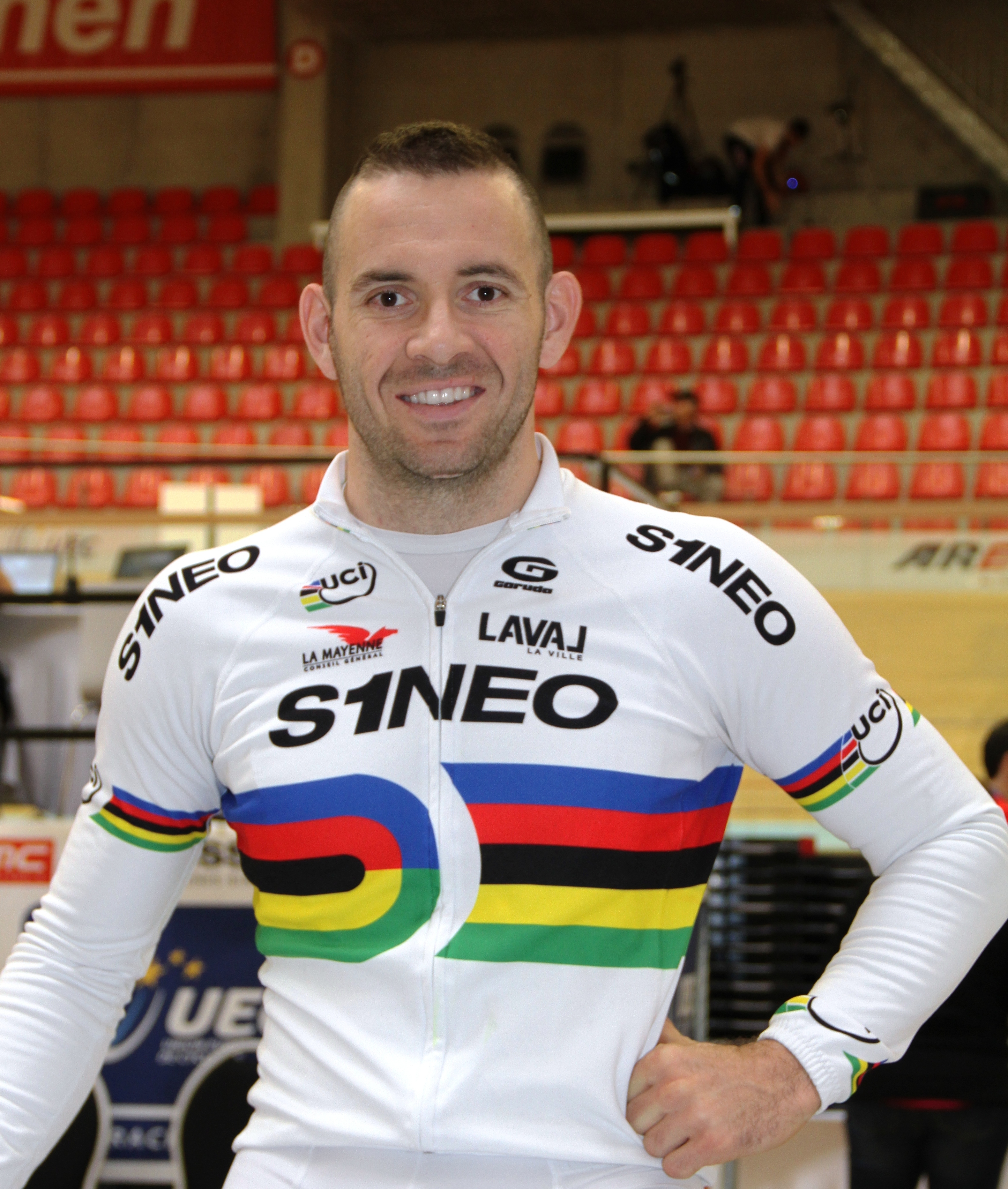 François Pervis, französischer Radsportler The making of this document was supported by the Community-Budget of Wikimedia Germany.